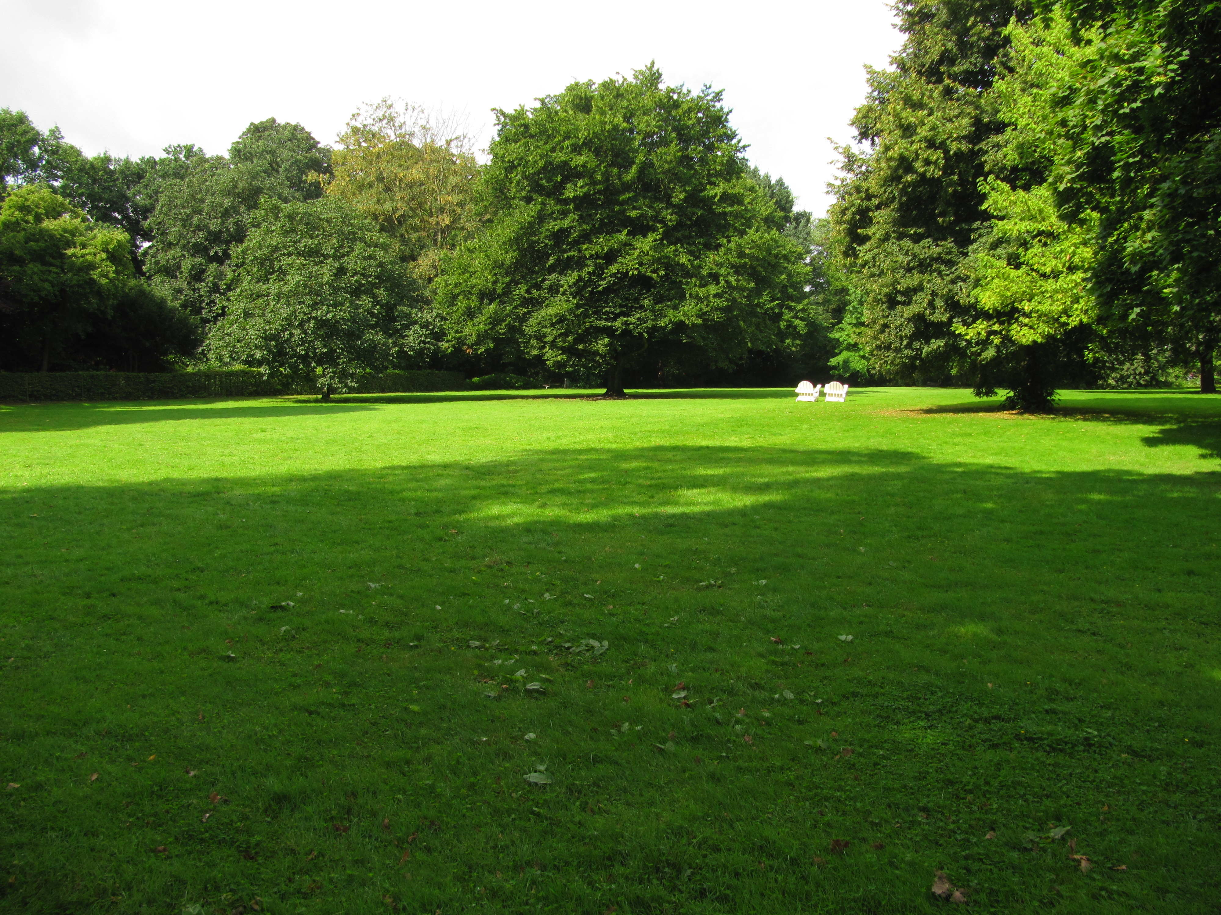 Blohms Park in Hamburg-Horn